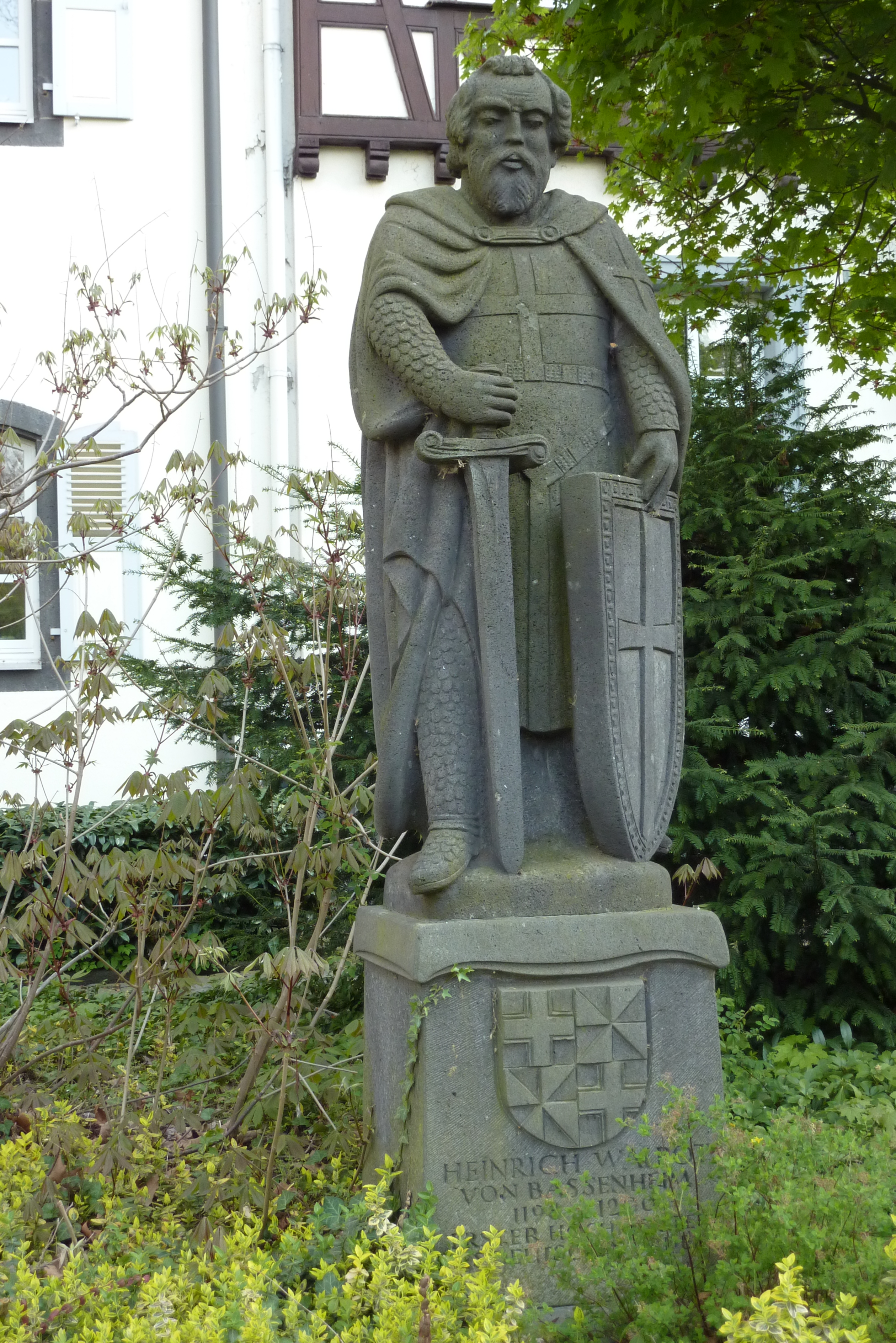 Statue des Heinrich Walpot von Bassenheim (gestorben 1200), von 1198 bis 1200 der erste Hochmeister des Deutschen Ordens in Bassenheim, Walpot-Platz